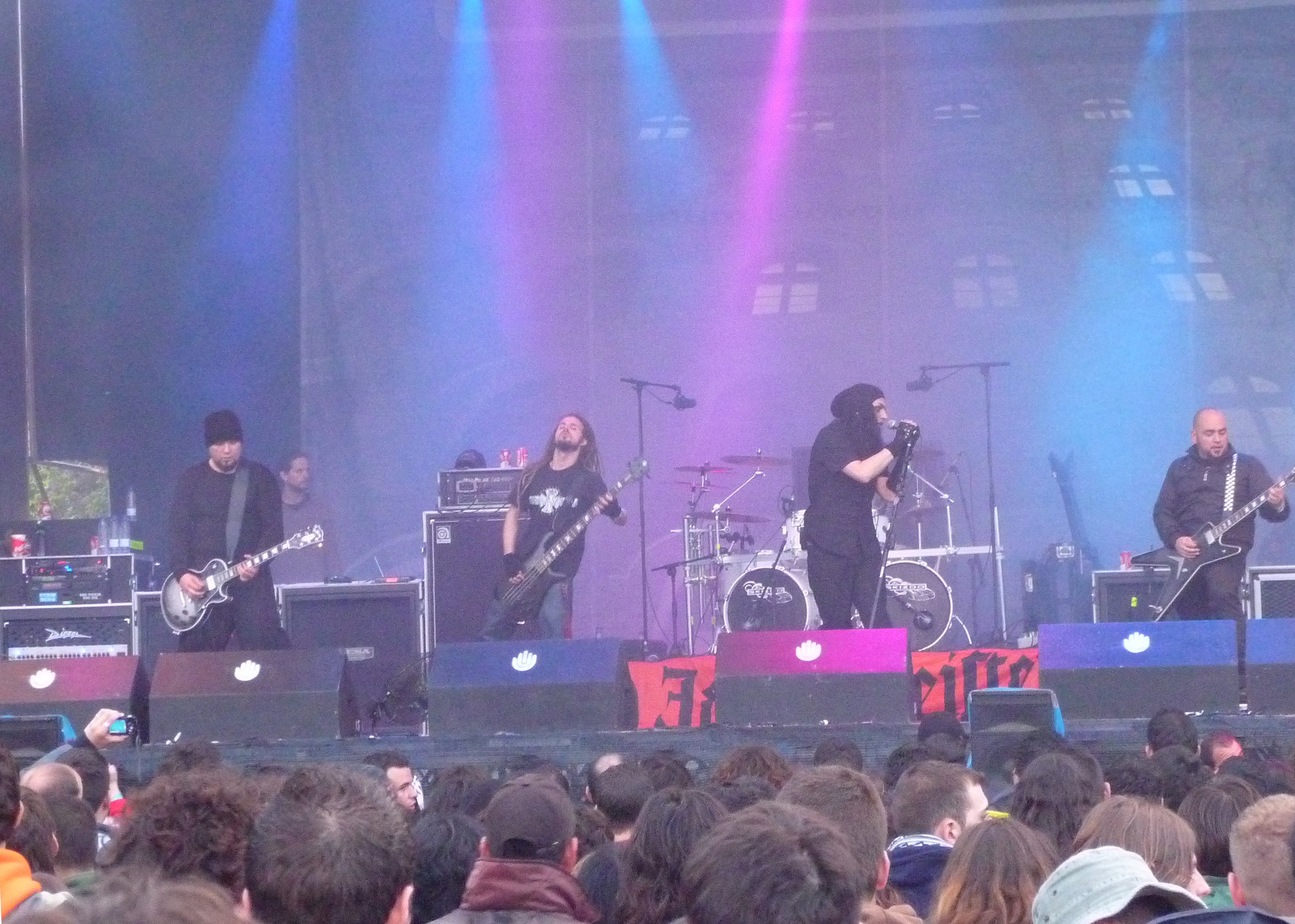 Skizoo en Extremúsika 2009